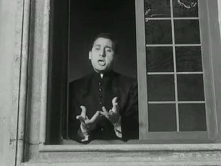 Screenshot del film "Ladro lui, ladra lei" di Luigi Zampa, 1958